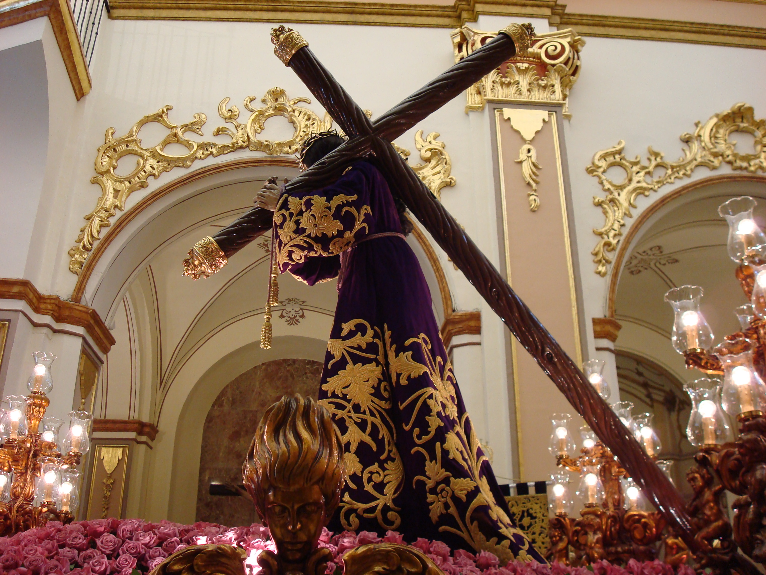 Cristo del Perdón, imagen titular del Paso Morado, Semana Santa Lorca